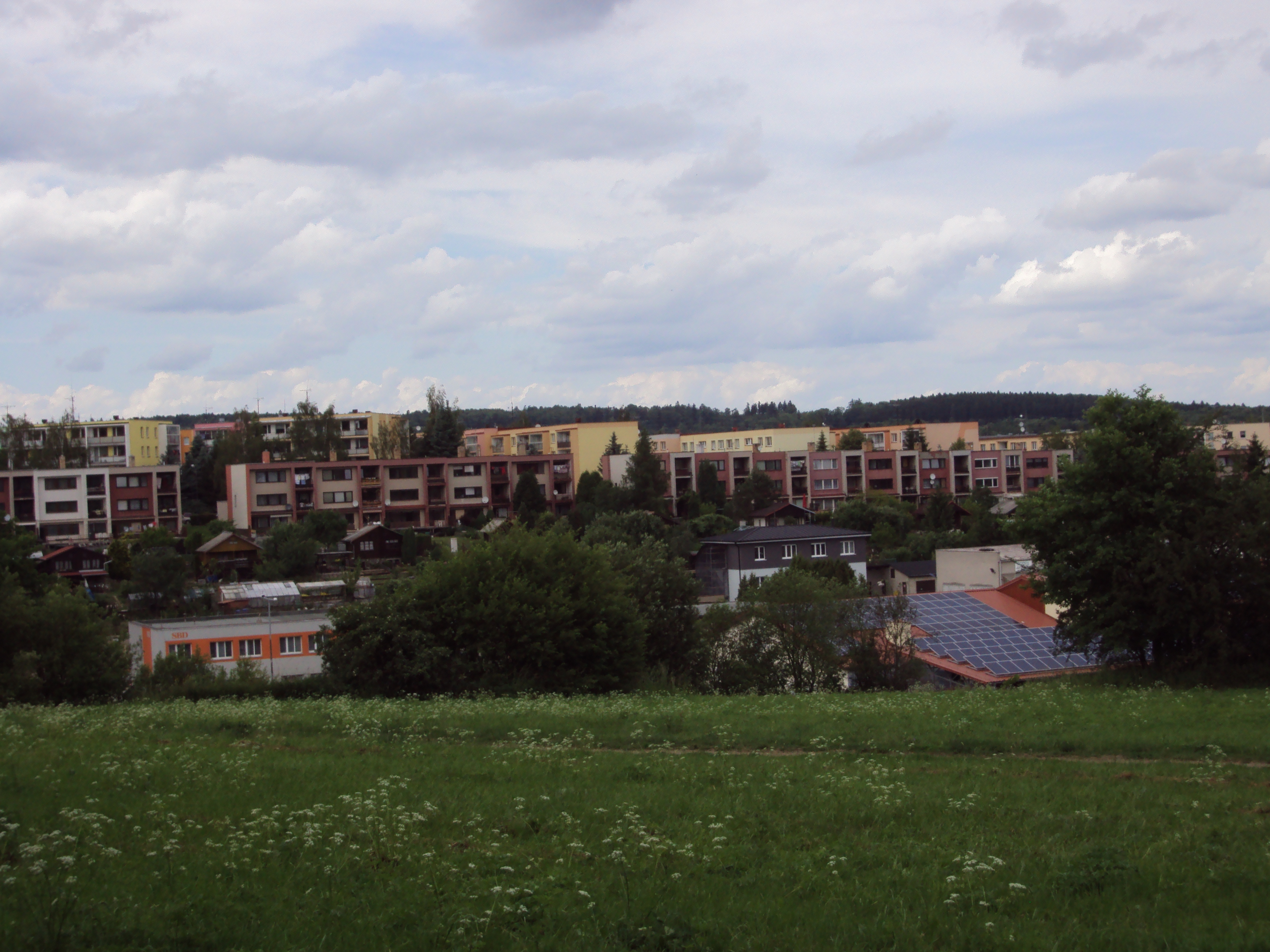 Sídliště